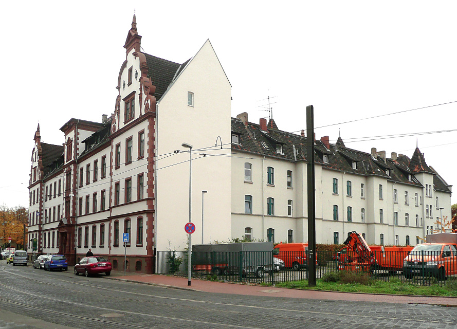 Gebäude Johann-Jobst Wagener'sche Stiftung in Hannover